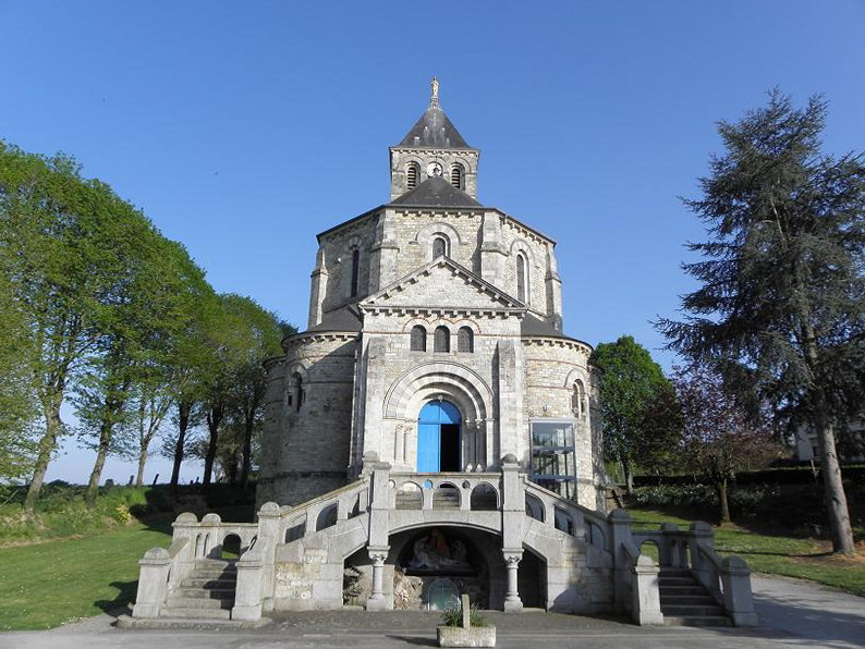 Chapelle de Notre-Dame de La Peinière à Saint-Didier (35).